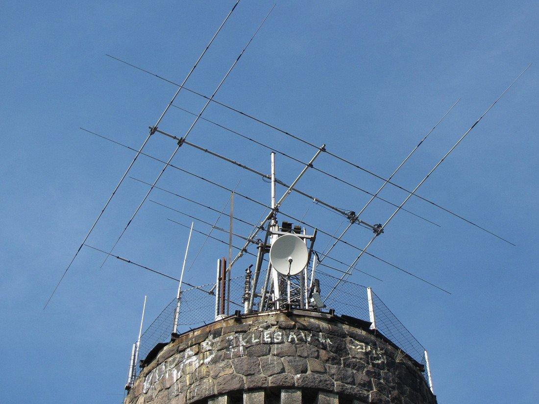 Zbliżenie na wyrafinowany system kierunkowych, obrotowych anten krótkofalowych nowego użytkownika wieży. Więcej info na ten temat w opisie obiektu. Zadziwiająca jest sprawność fizyczna poprzednich użytkowników budowli, tj. graficiarzy.